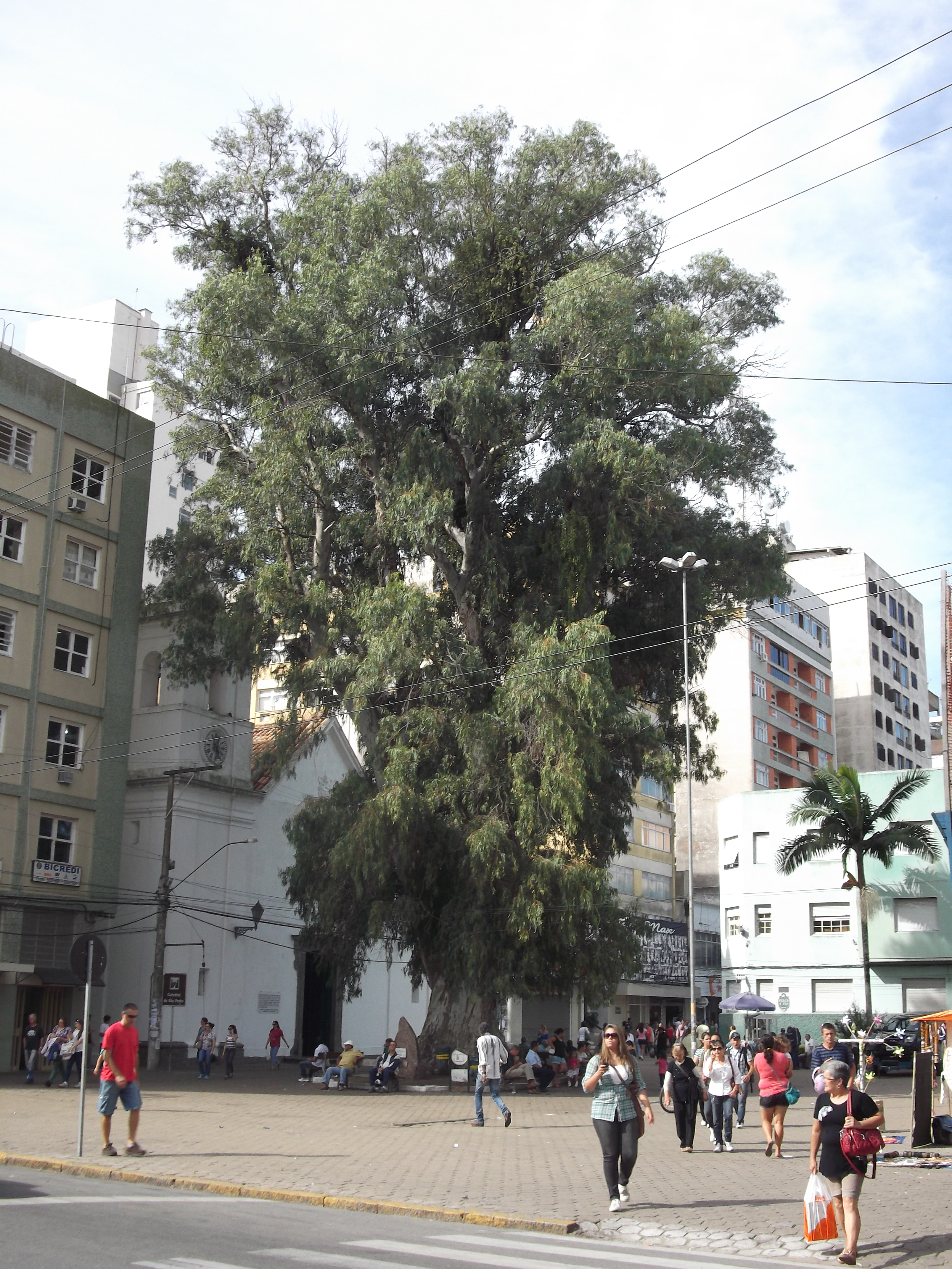 Praça Doutor Pio, Rio Grande, Brasil. Eucalipto mais antigo do Rio Grande do Sul, plantado em 1877.